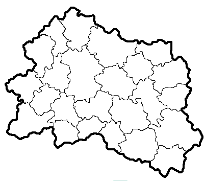 Позиционная карта Орловской области